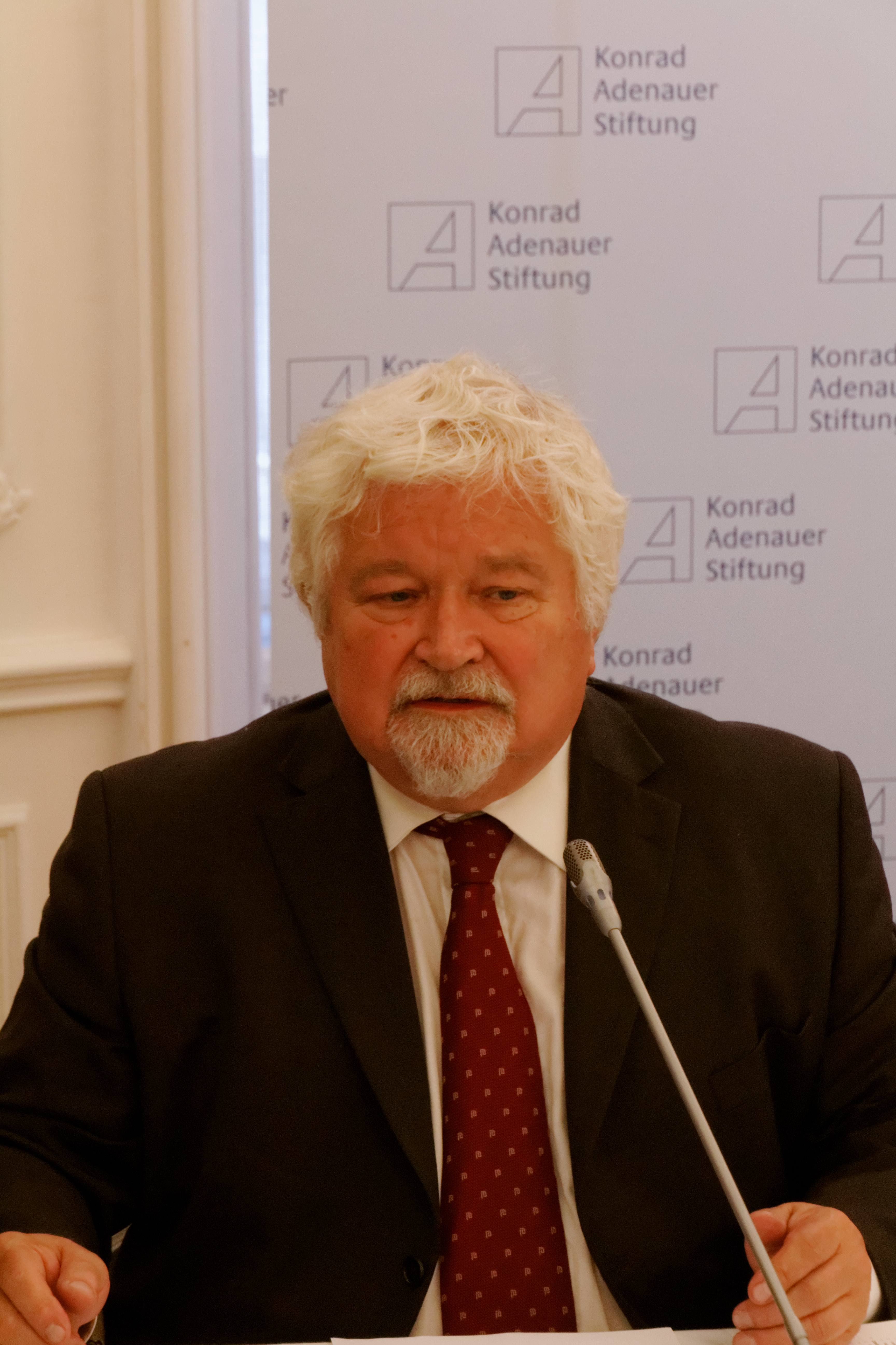 Petr Pithart; Andrássy Universität Budapest 2013